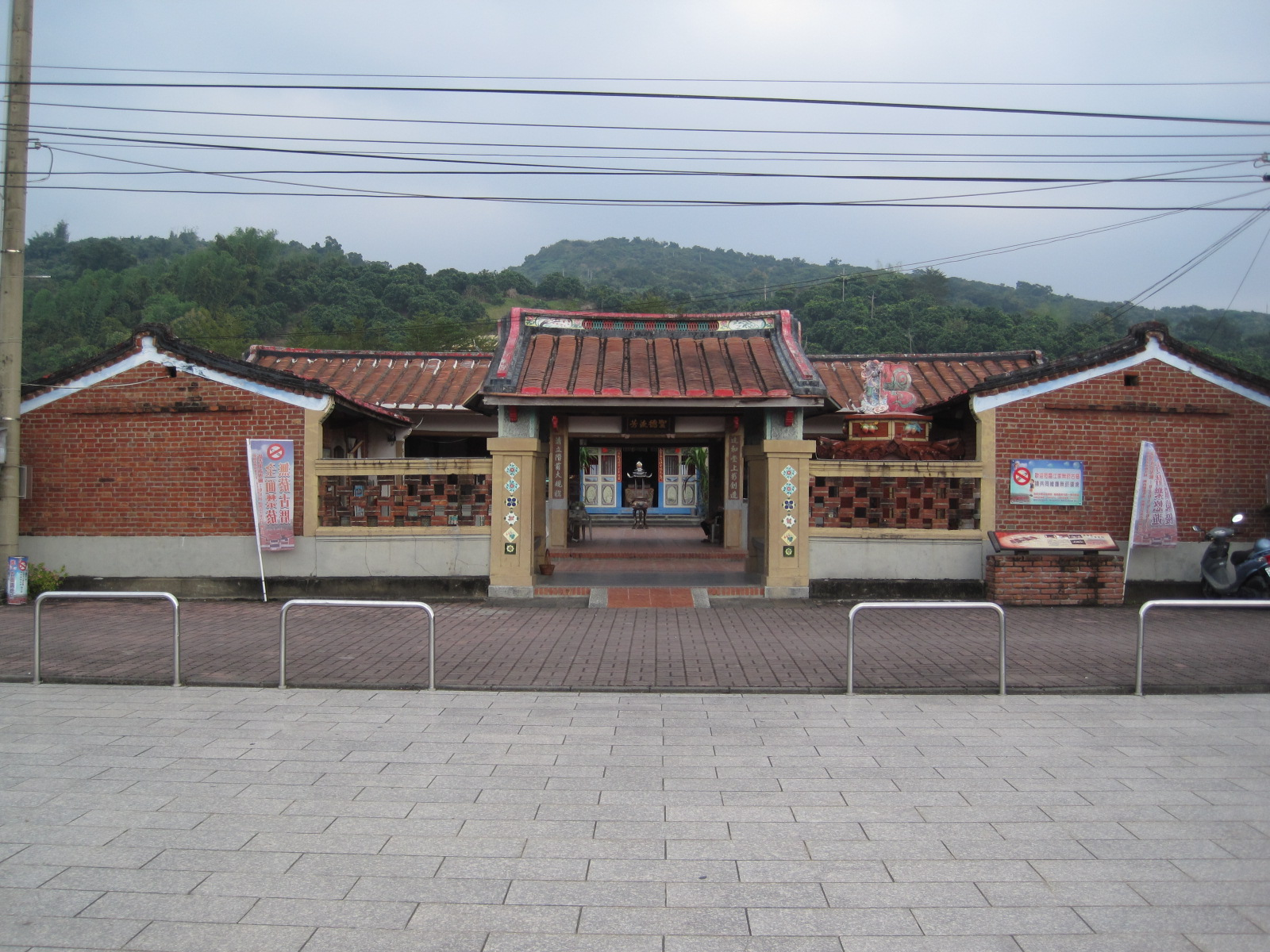 臺南楠西區的鹿陶洋江家宗祠